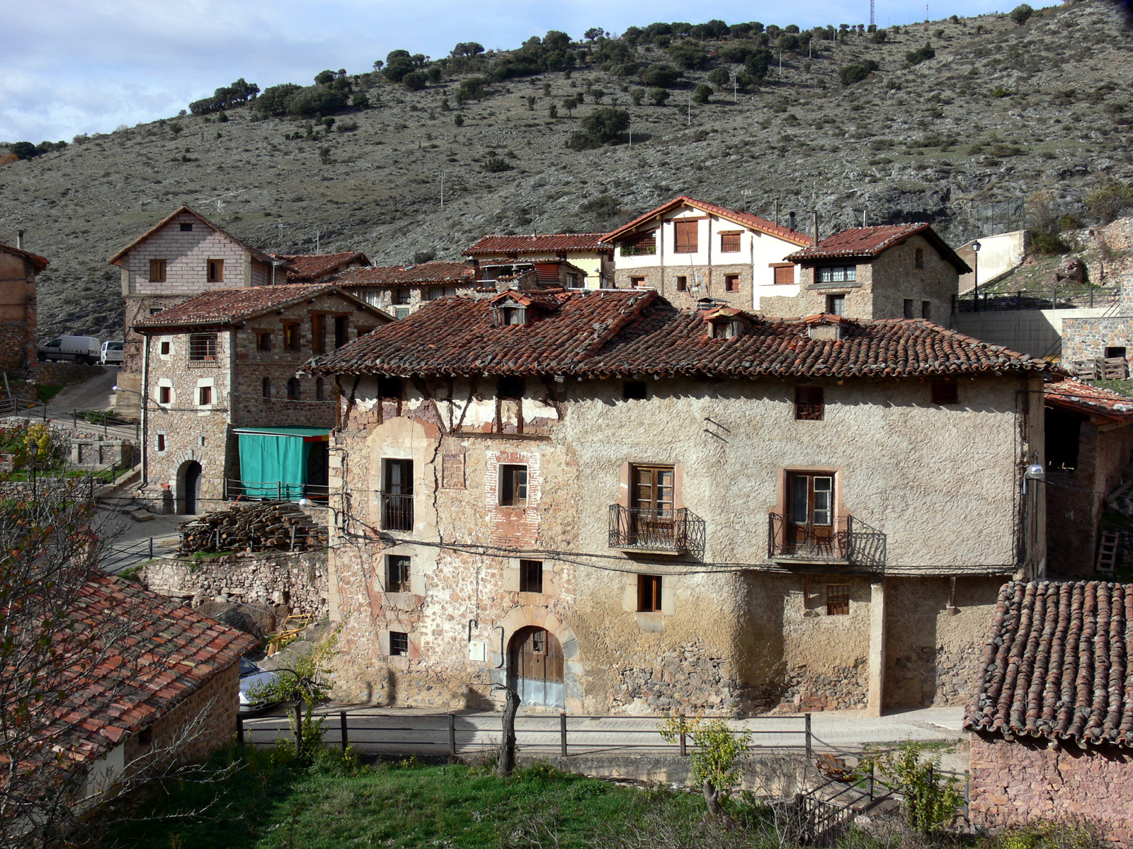 Gallinero de Cameros, La Rioja - España.